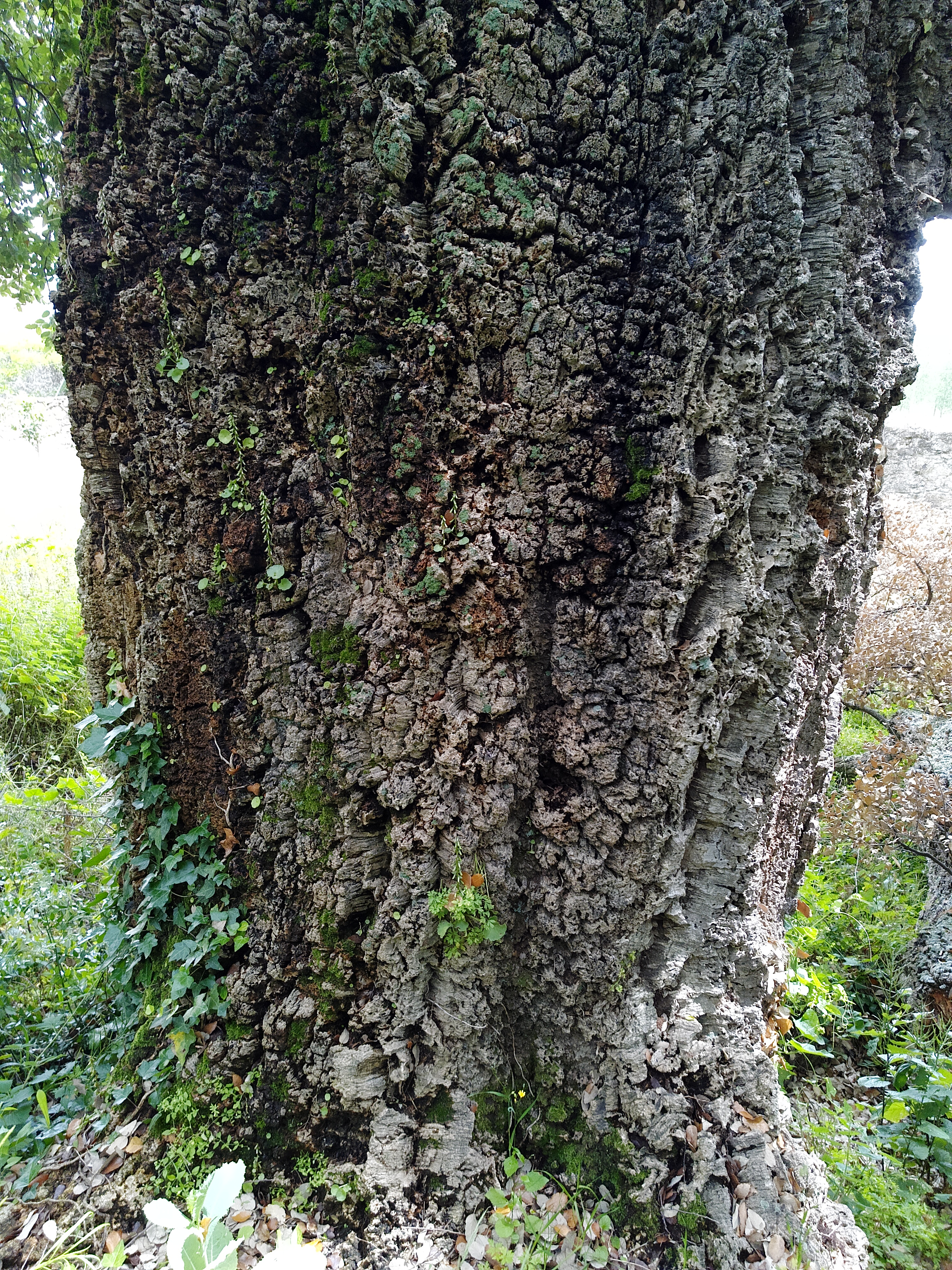 Alta Garrotxa - Massís de les Salines This is a photography of a Special Area of Conservation in Spain with the ID: ES5120001. Natura2000 entry, EEA entry